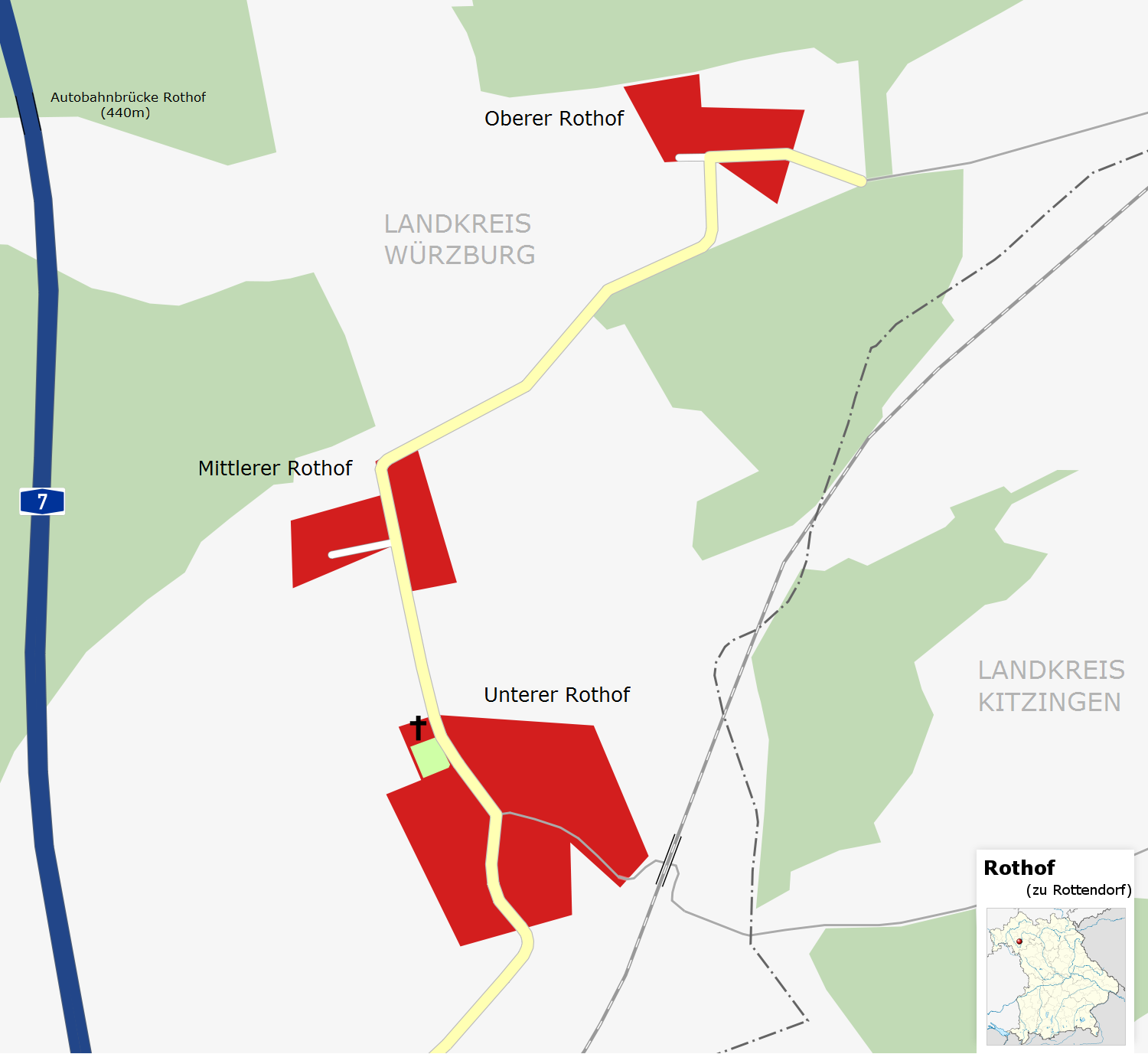 Karte des Ortsteils Rothof von Rottendorf, Bayern.